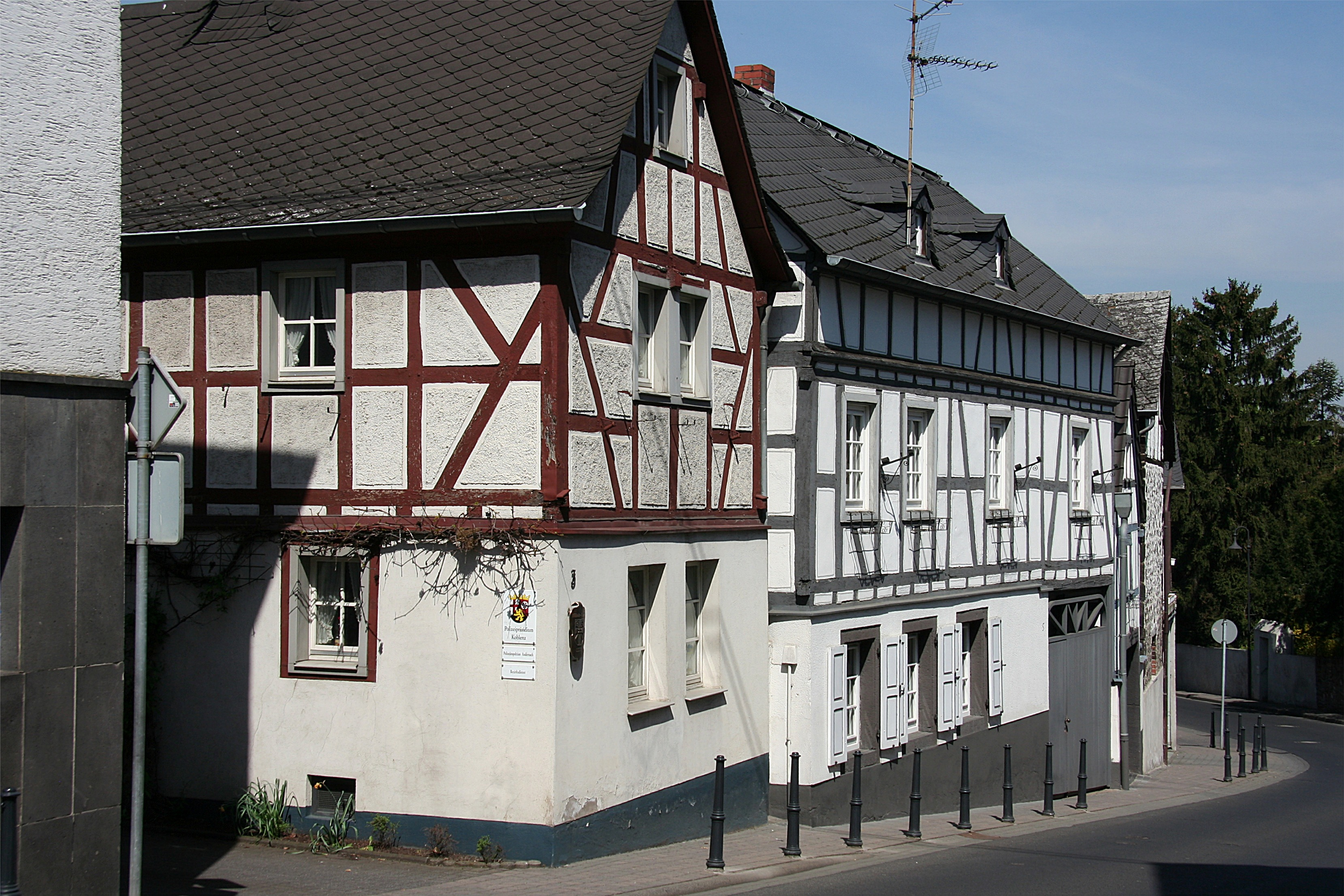 Mülheim-Kärlich, Burgstraße 3 und 5